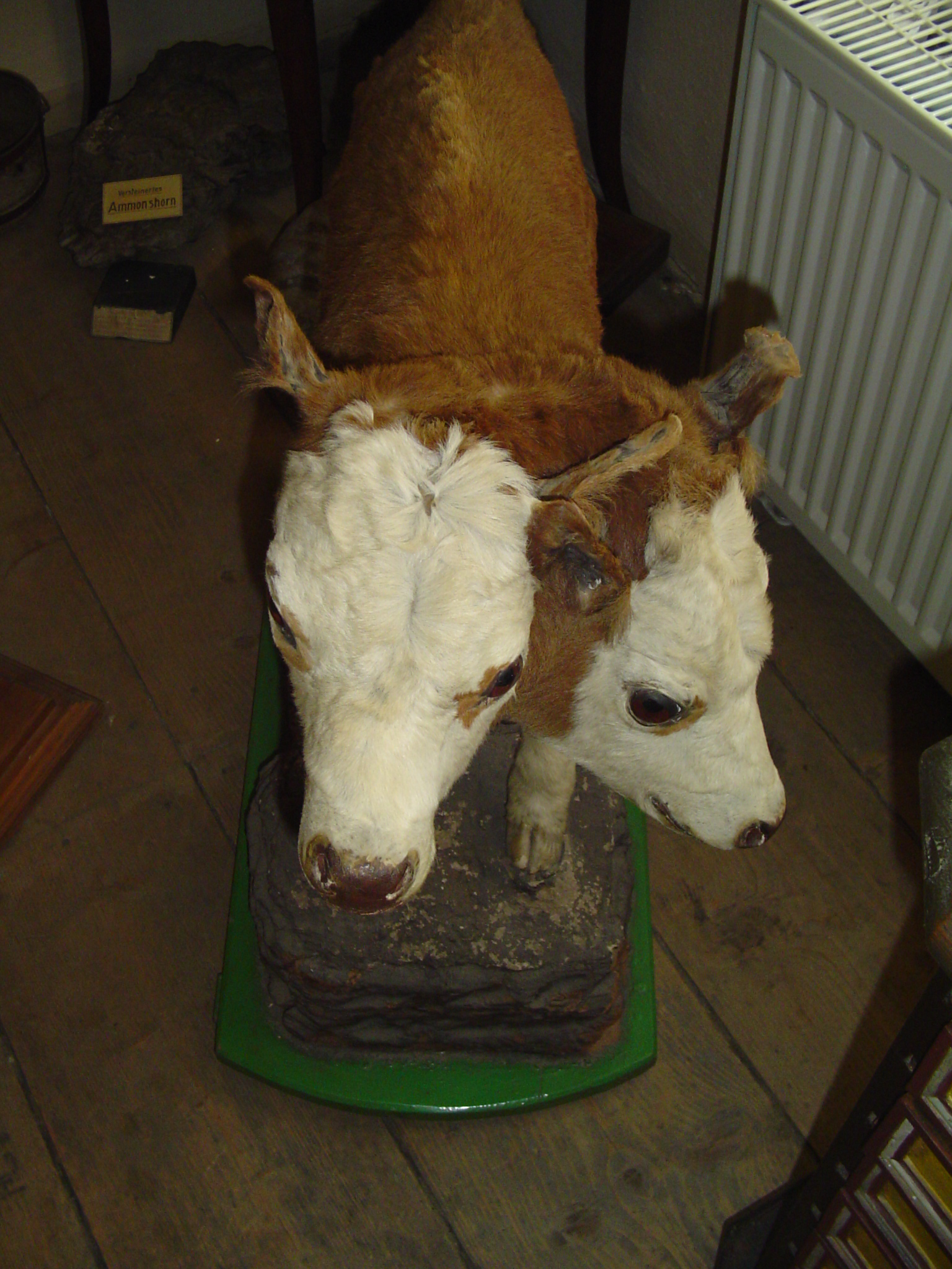 Aufgenommen im Heimatmuseum und Naturalienkabinett Waldenburg in Sachsen (mit Fotoerlaubnis)